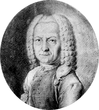 Depicted person: Benedetto Marcello